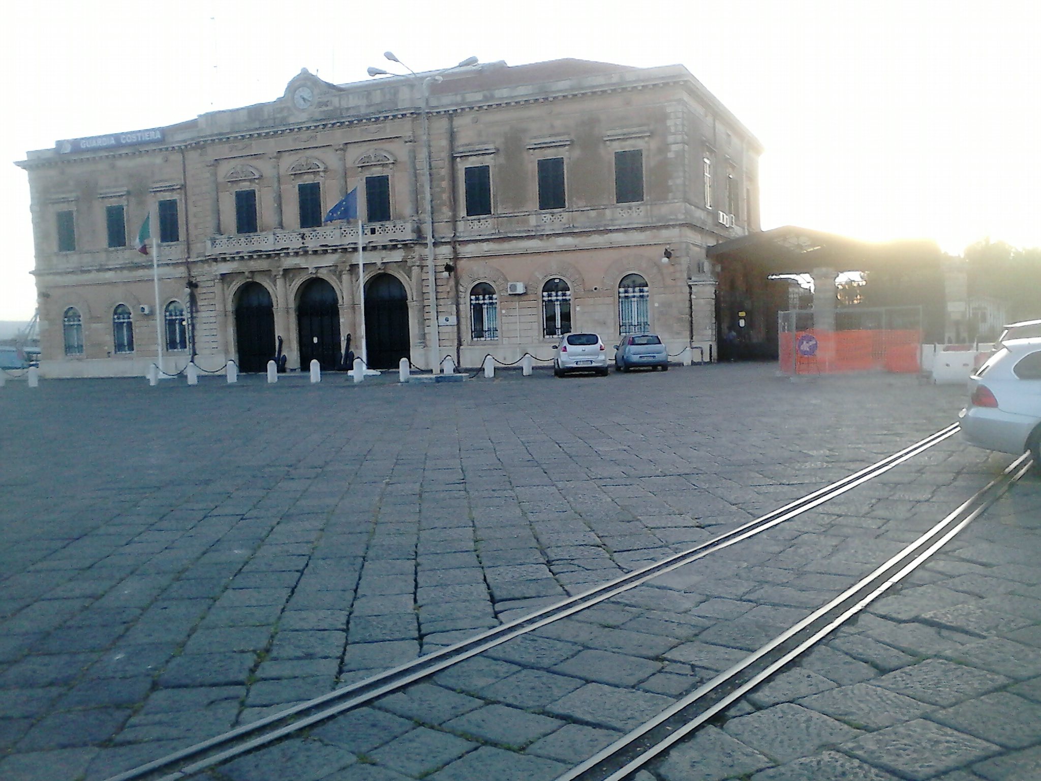 L'ex fabbricato viaggiatori della stazione di Siracusa Marittima, ora sede della Guardia Costiera